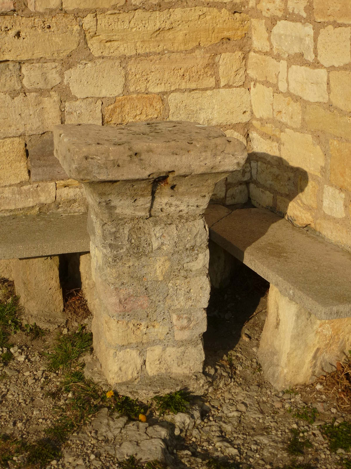 Капитель, сохранившаяся от крепости "старый Кирхберг" на горе Хаусберг около Йены, 10 век, находится за кафе у Фукстурма